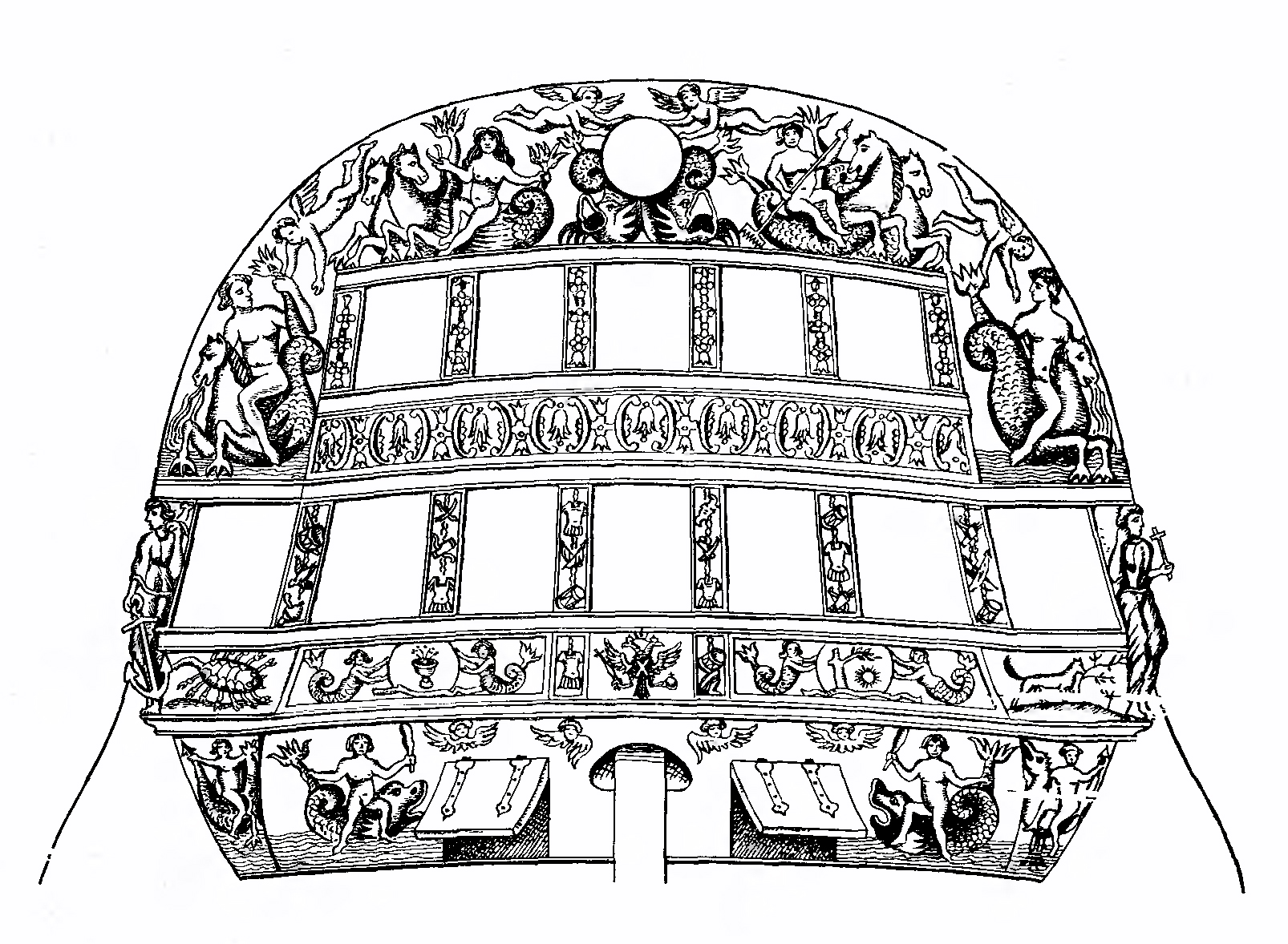 Чертёж кормового рисунка линейного корабля «Ингерманланд» 1715 года постройки.